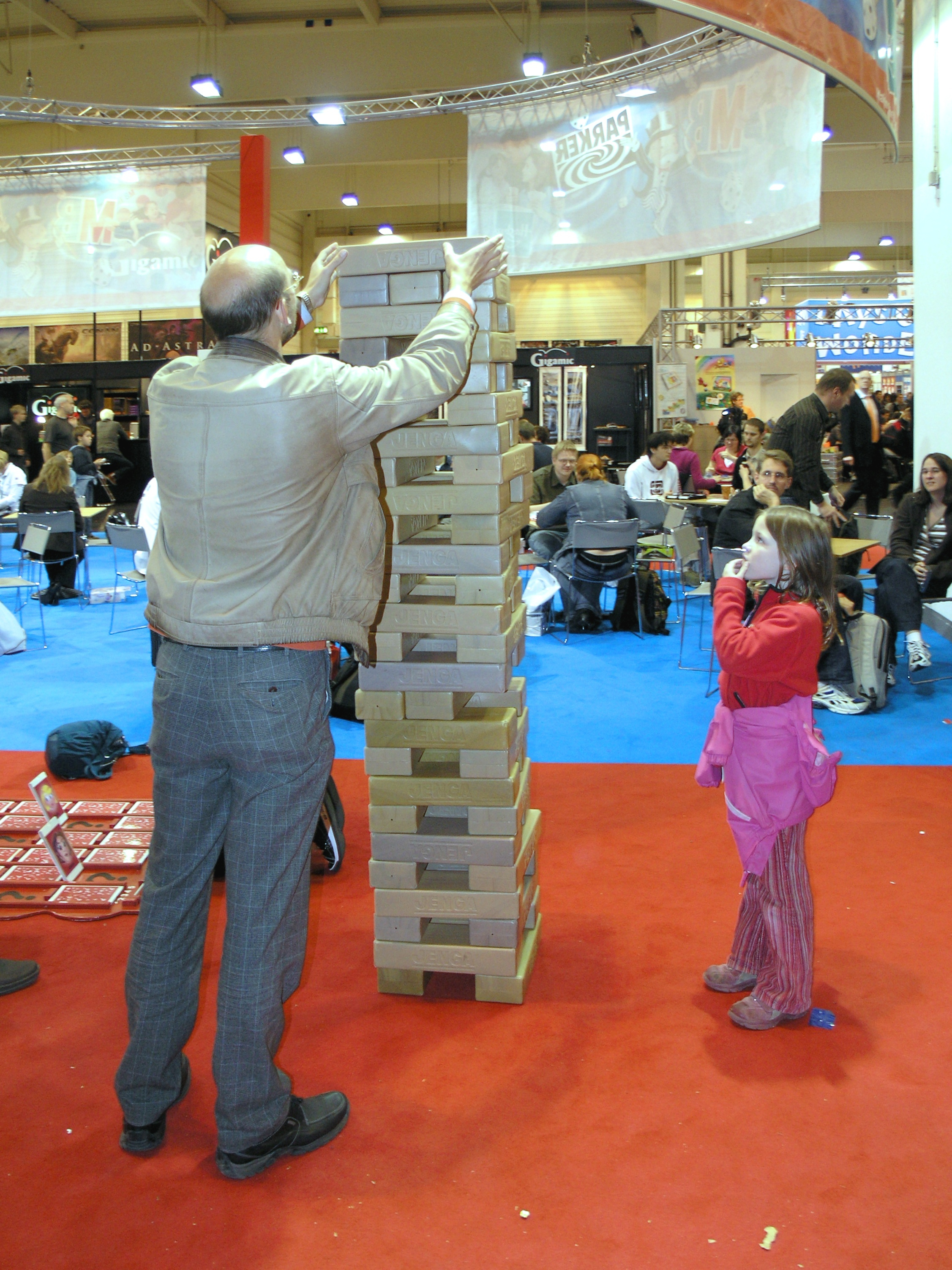 Internationalen Spieltage SPIEL 2008